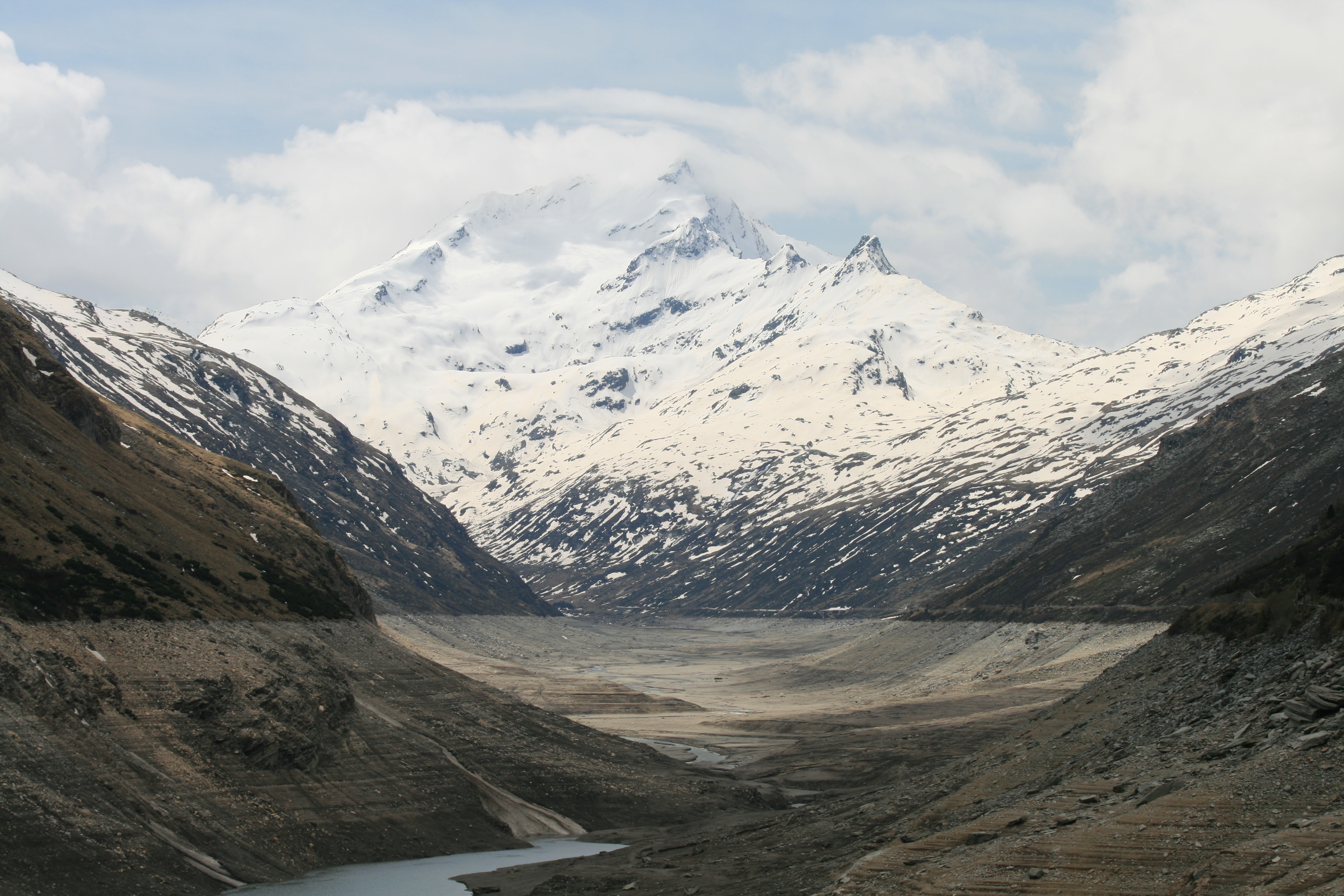 Lago di Lei